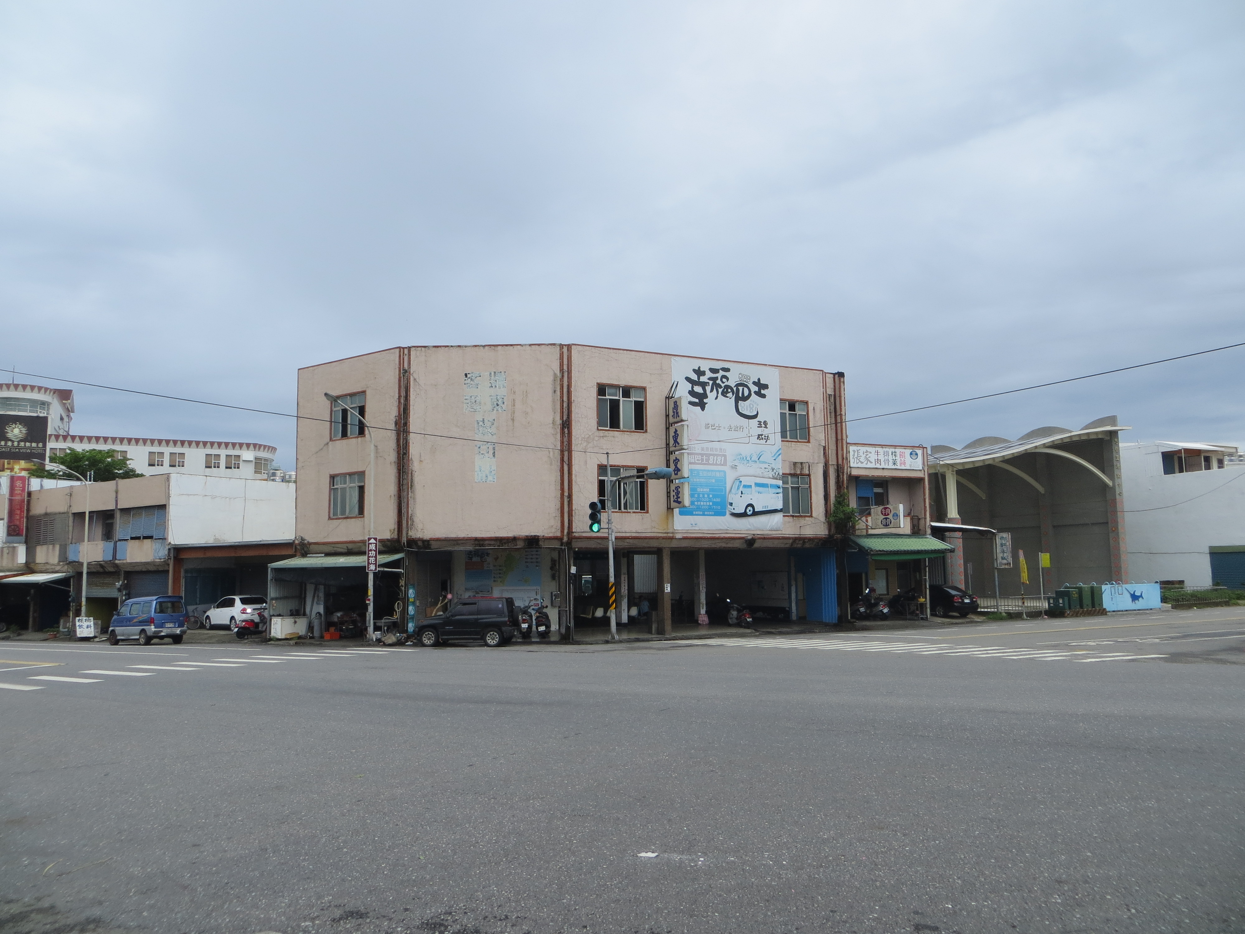 2016年8月12日，遠觀鼎東客運海線營運區成功站整體外觀，可見其地處路口；左遠方為臺11線，右遠方為臺東縣成功鎮五權路。